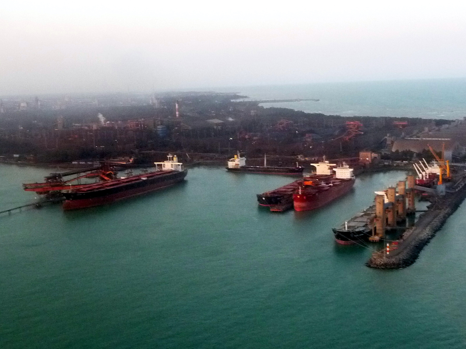 Vista parcial do Porto de Tubarão ES